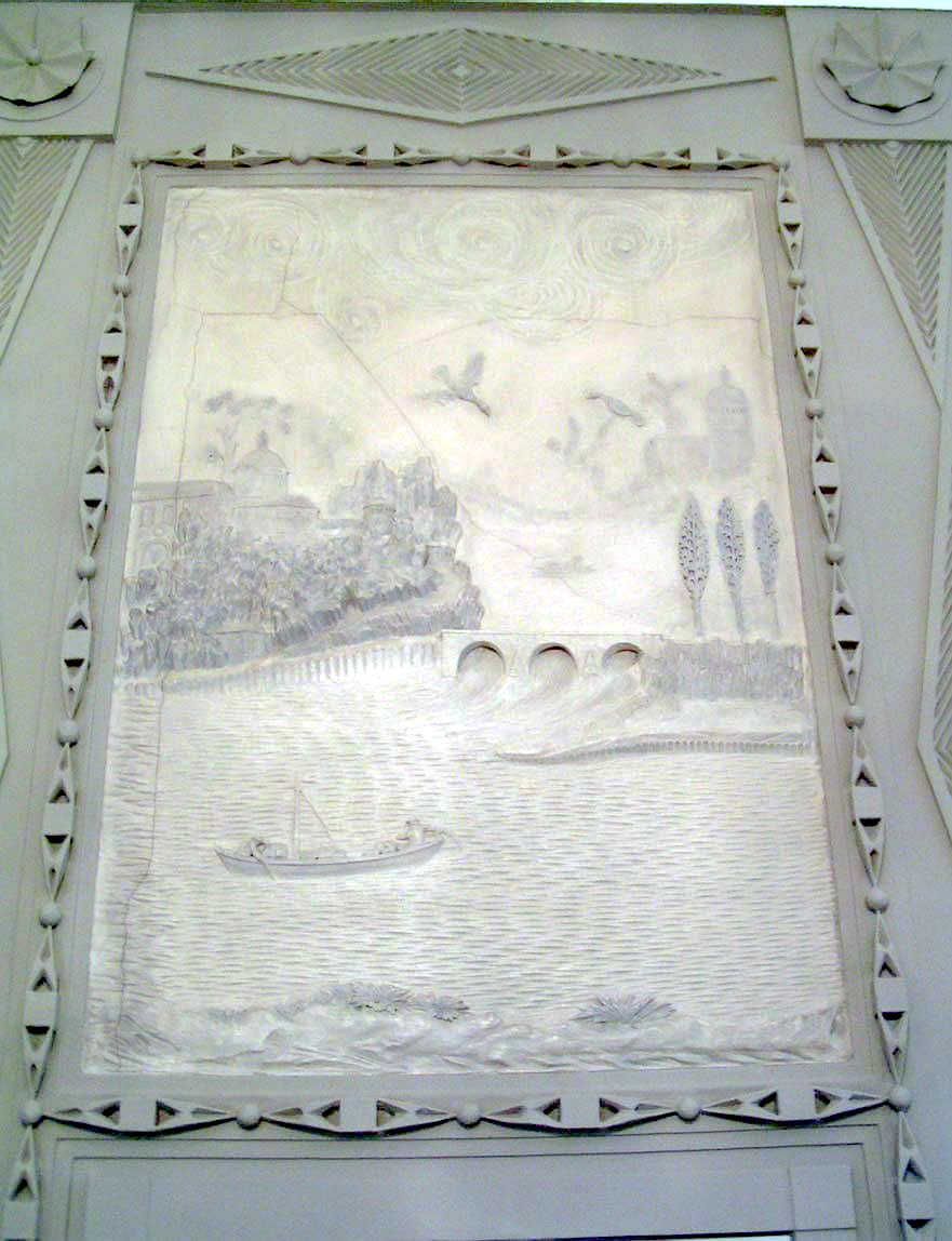 Sierstucwerk toegeschreven aan P.N. Gagini. Kasteel Wolfrath, Holtum (L).